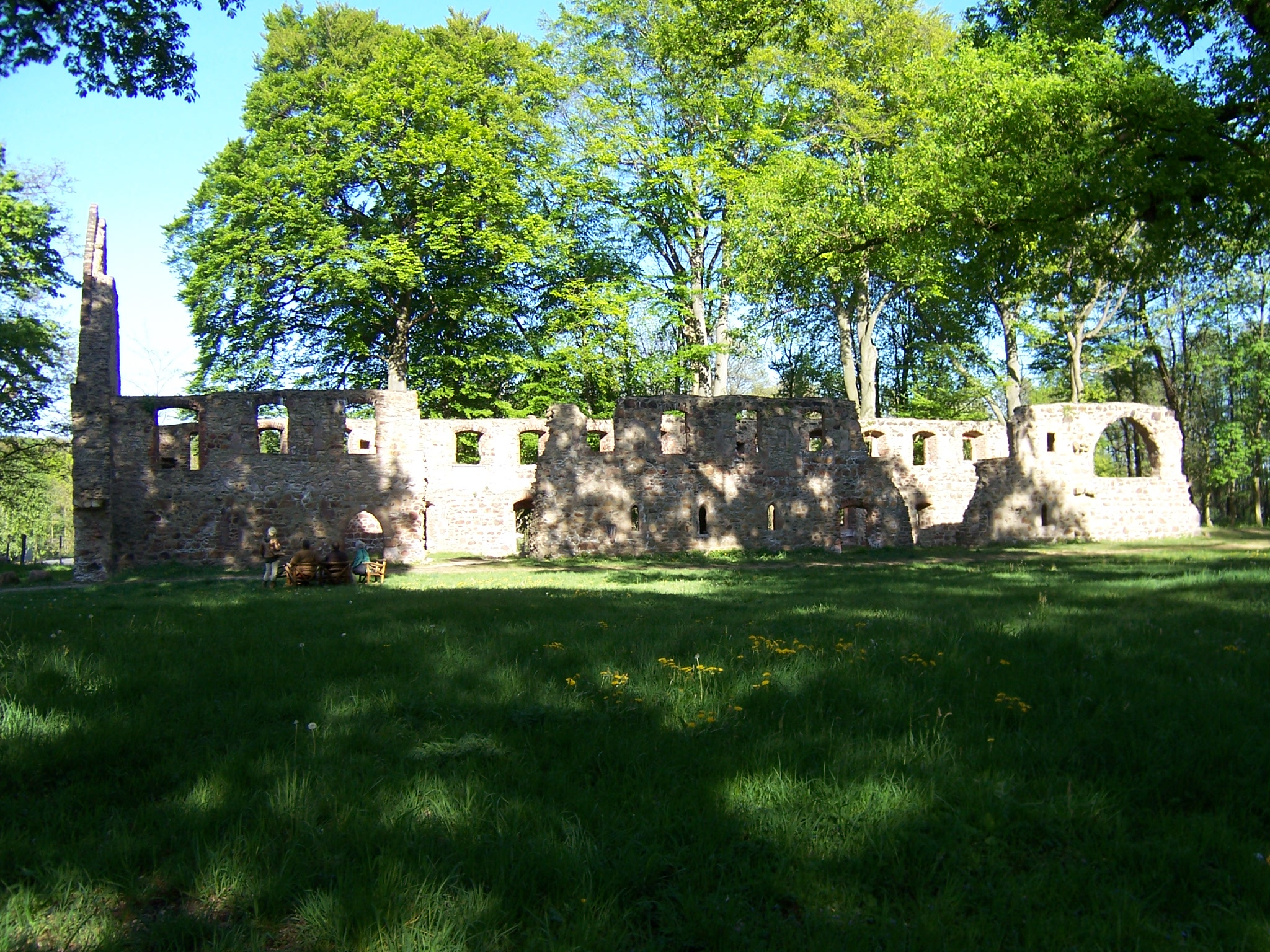 Ruine des Zisterzienserinnenklosters Nimbschen bei Grimma, Sachsen